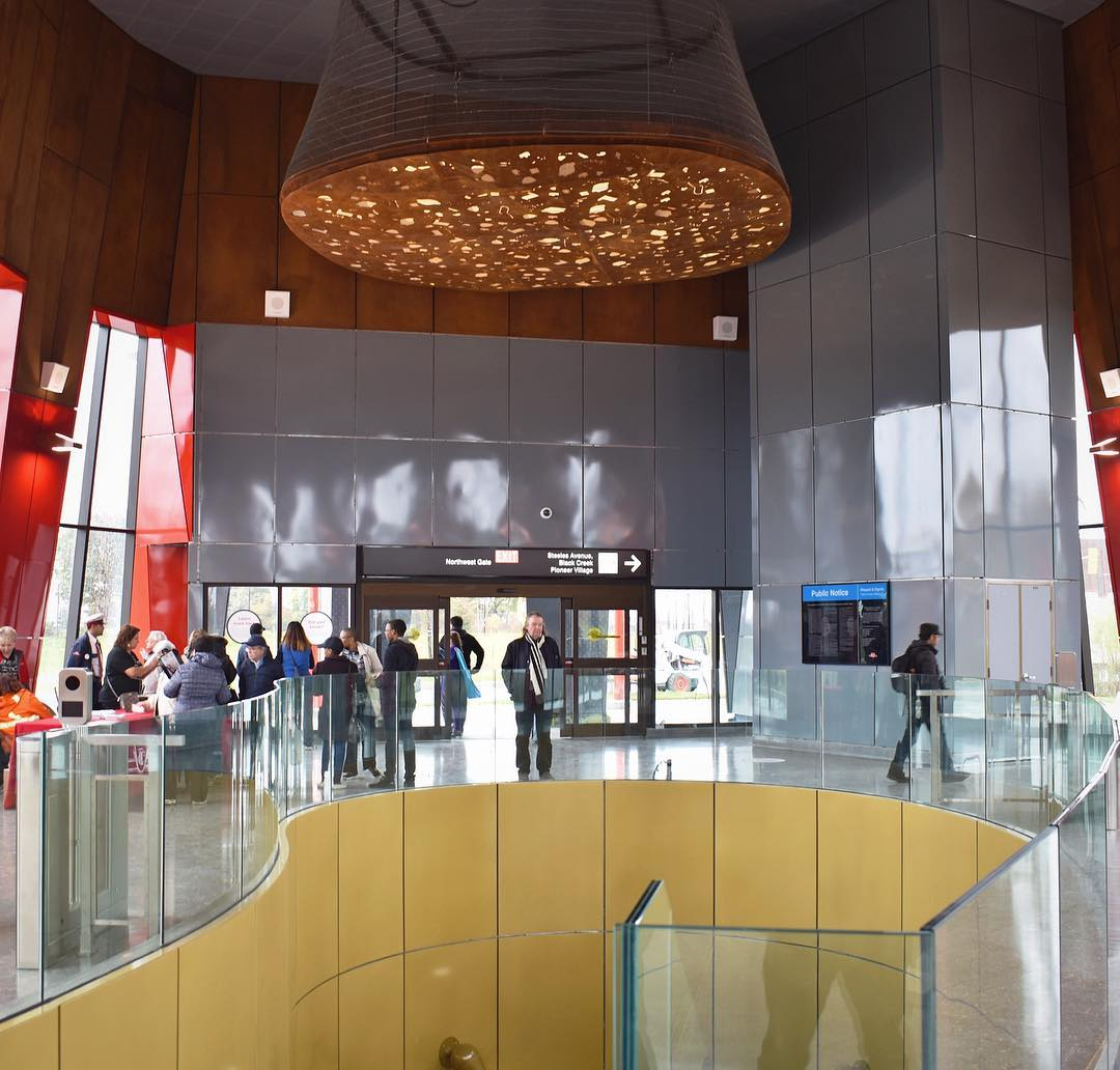 via Instagram ift.tt/2gXMGiq